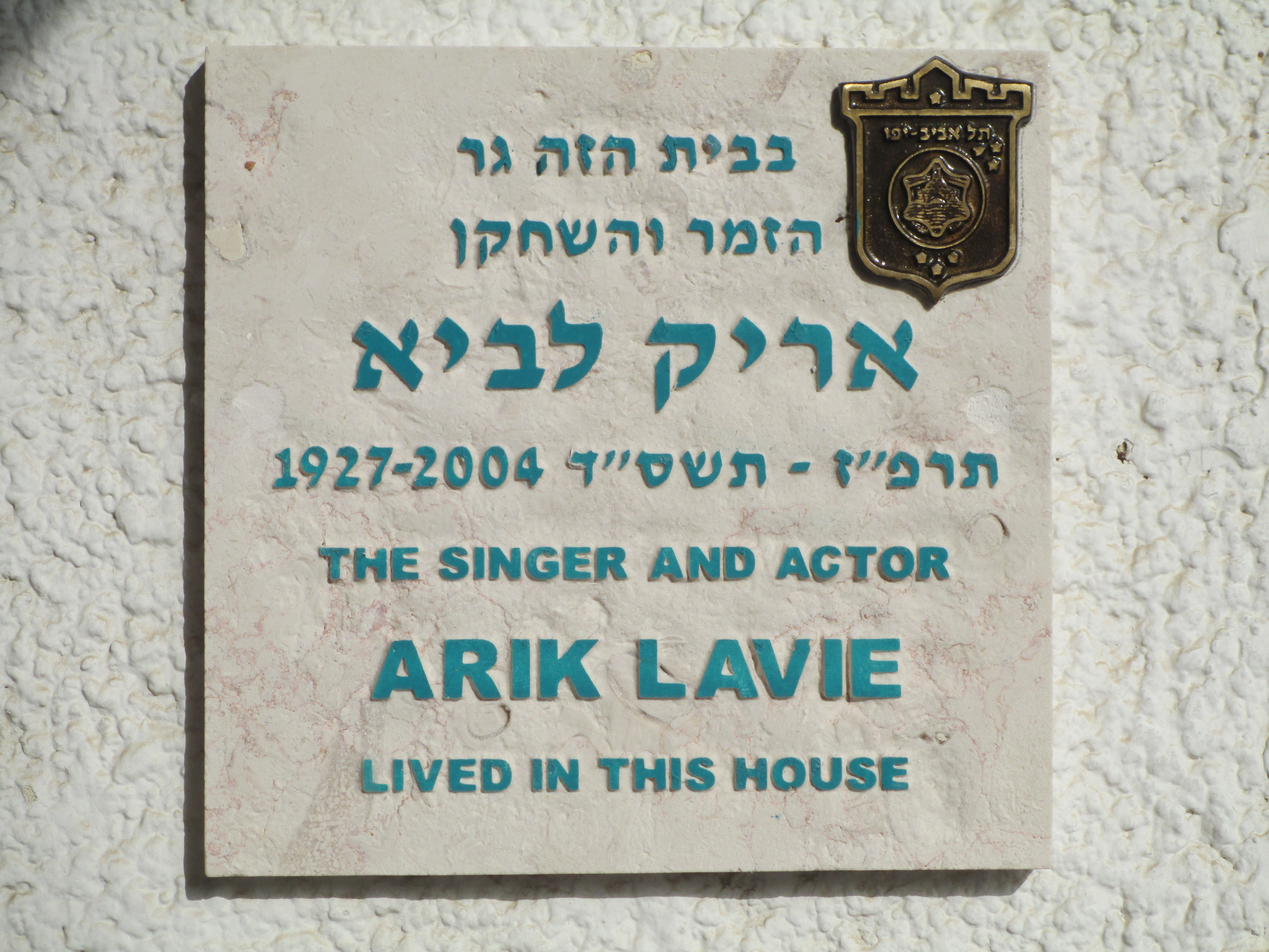 לוחית זיכרון בכניסה לביתו של הזמר-שחקן אריק לביא ברח' בזל 38 בתל אביב